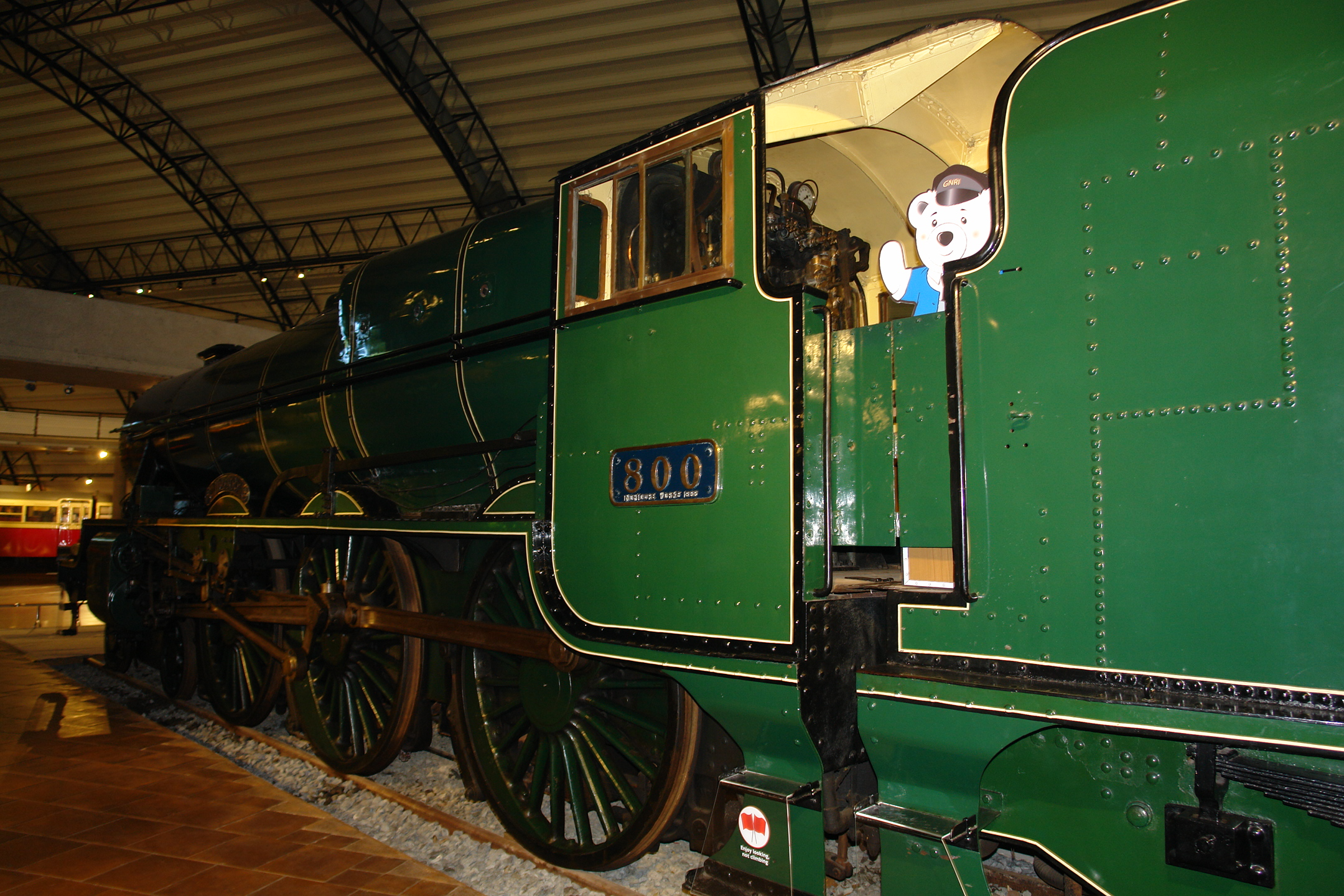 Ulster Transport Museum, Cultra